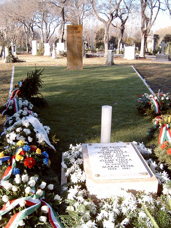 József Áronné (1876-1919), József Attila (Budapest, 1905. április 11. – Balatonszárszó, 1937. december 3.) költő, József Etelka (Budapest, 1903. március 22. - 2004. április 3.), József Jolán (Budapest, 1899. január 16. – Budapest, 1950. június 25.) író és Makai Péter (Hódmezővásárhely, 1932. dec. 4.–Budapest, 1991. nov. 7.) díszlet- és jelmeztervező, rendező sírja Budapesten. Kerepesi temető: 35-2-59.